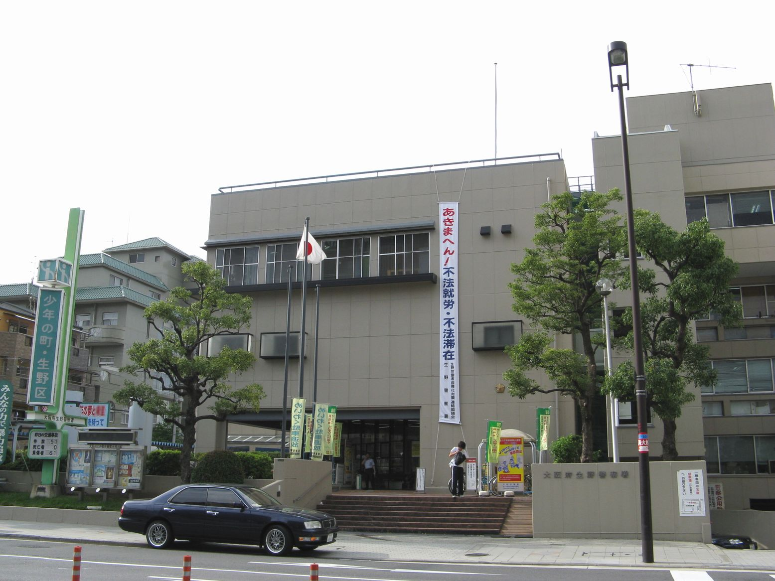 生野警察署